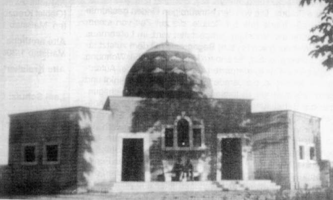 Żydowska kaplica w Kluczborku